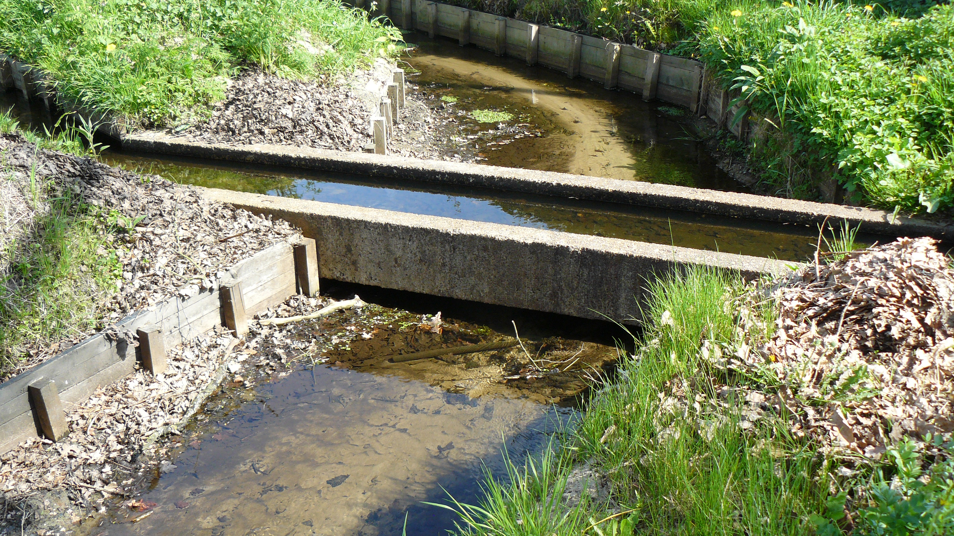 Aquaduct van sloot Slatsdijk/sloot Lonapark over de Loenense Beek, Molen-Allee, Loenen (Veluwe). Sloot Slatsdijk, over het aquaductje, voorziet de slotgracht van kasteel Ter Horst van water, de Loenense beek die later werd gegraven, voorziet bet Apeldoorns kanaal van water.